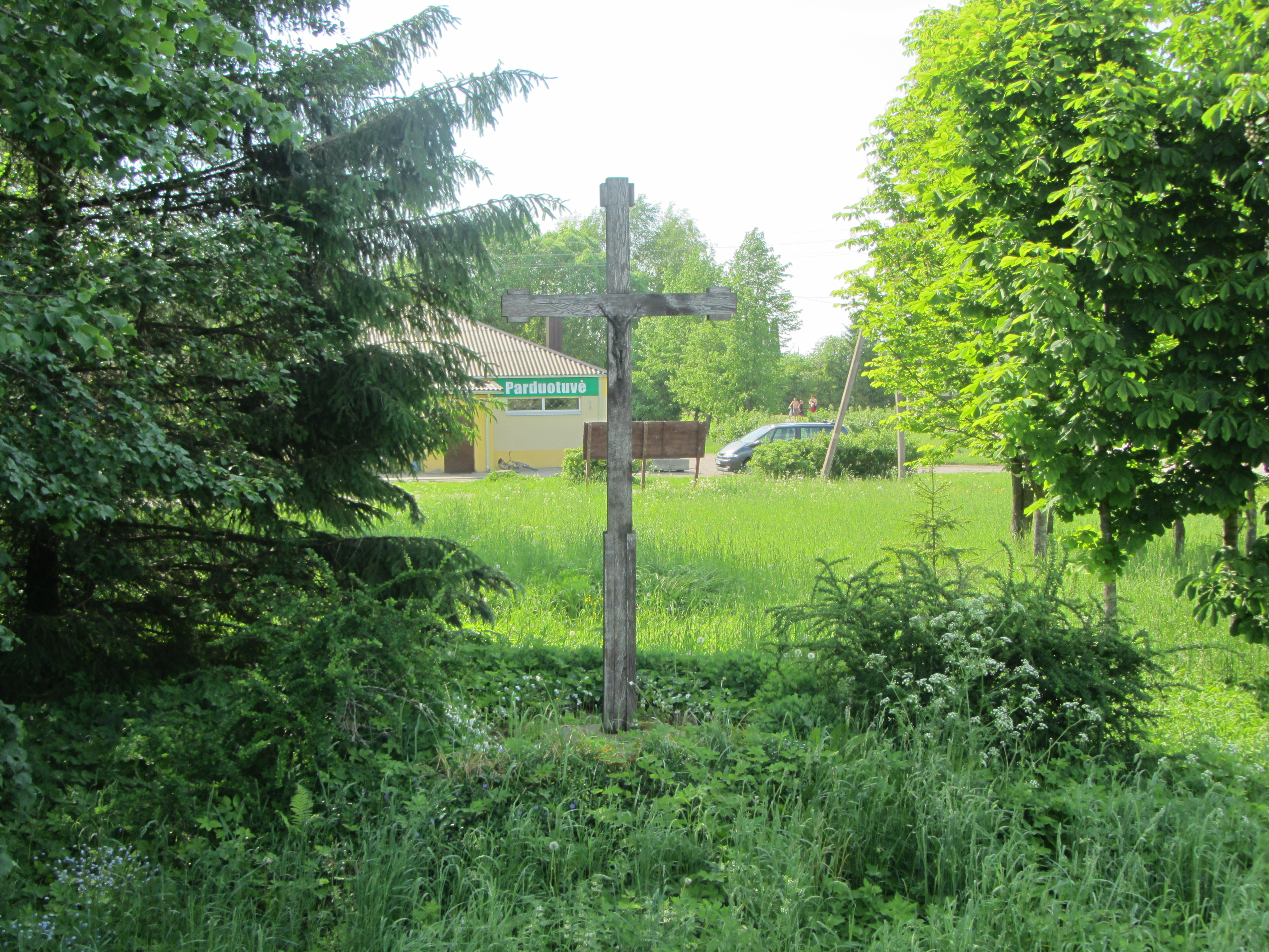 Vileikiškiai 19182, Lithuania